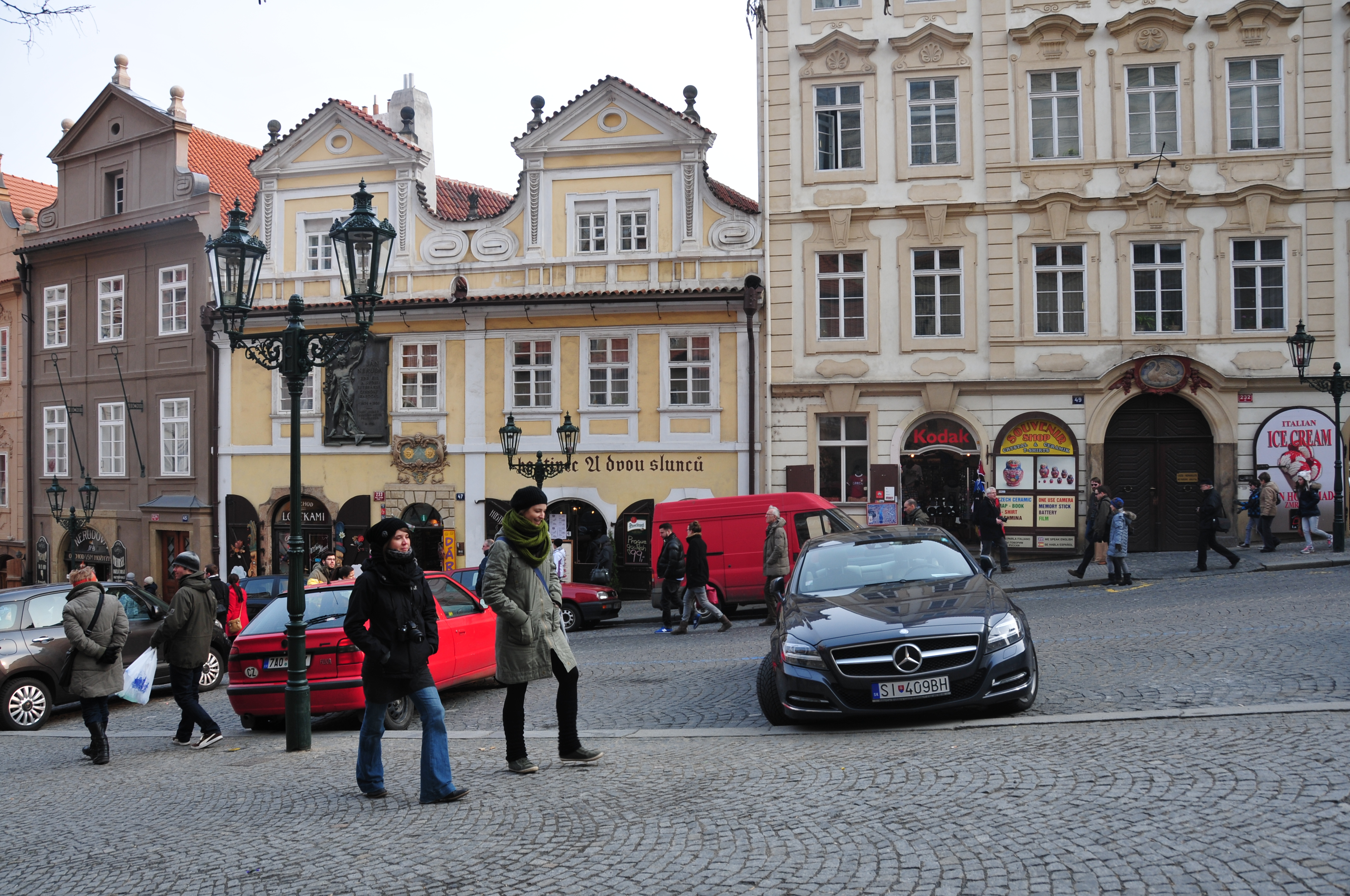 Prag